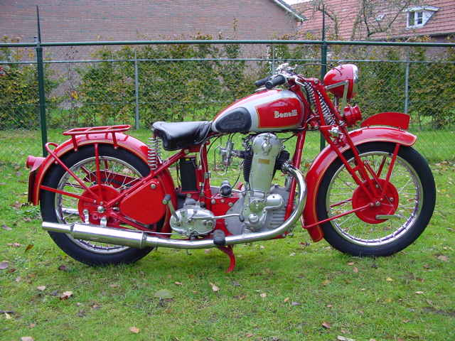 Benelli 4TN 500 motorcycle 1935.